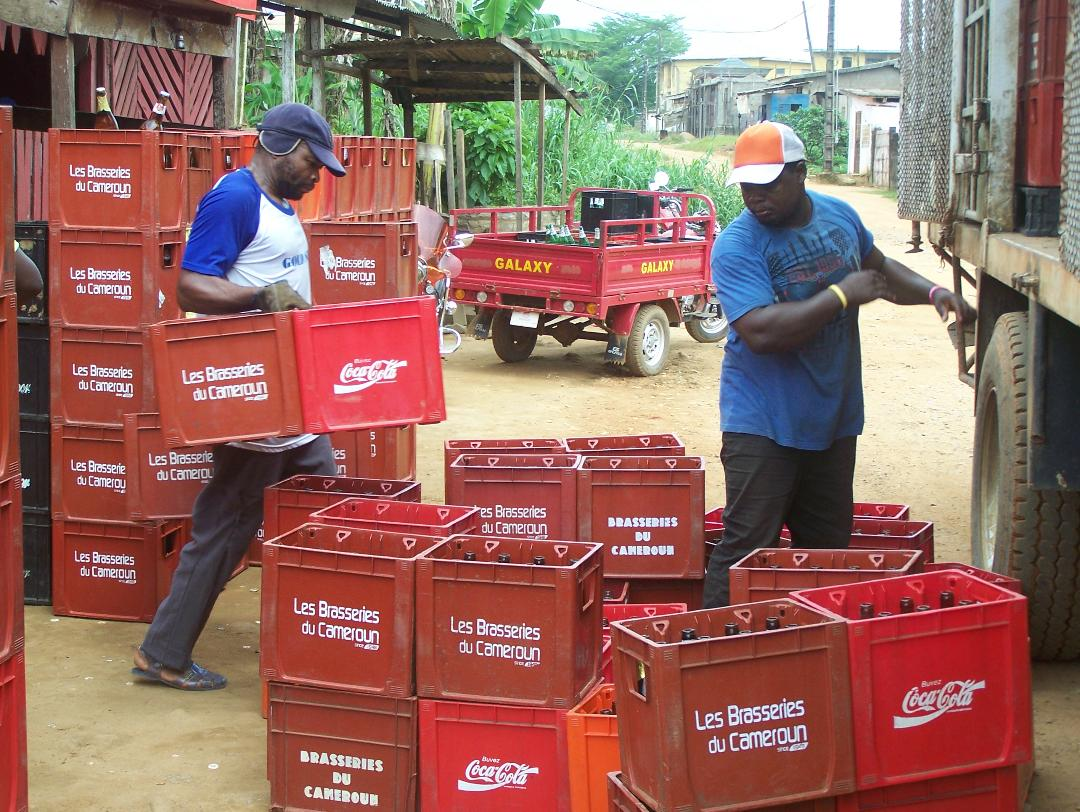 Agents d'une société brassicole entrain de charger les casiers This is an image of "African people at work" from Cameroon